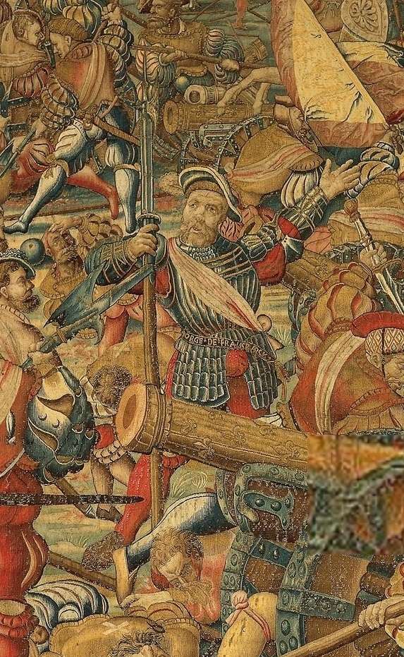 Arazzi Battaglia di Pavia - Georg von Frundsberg